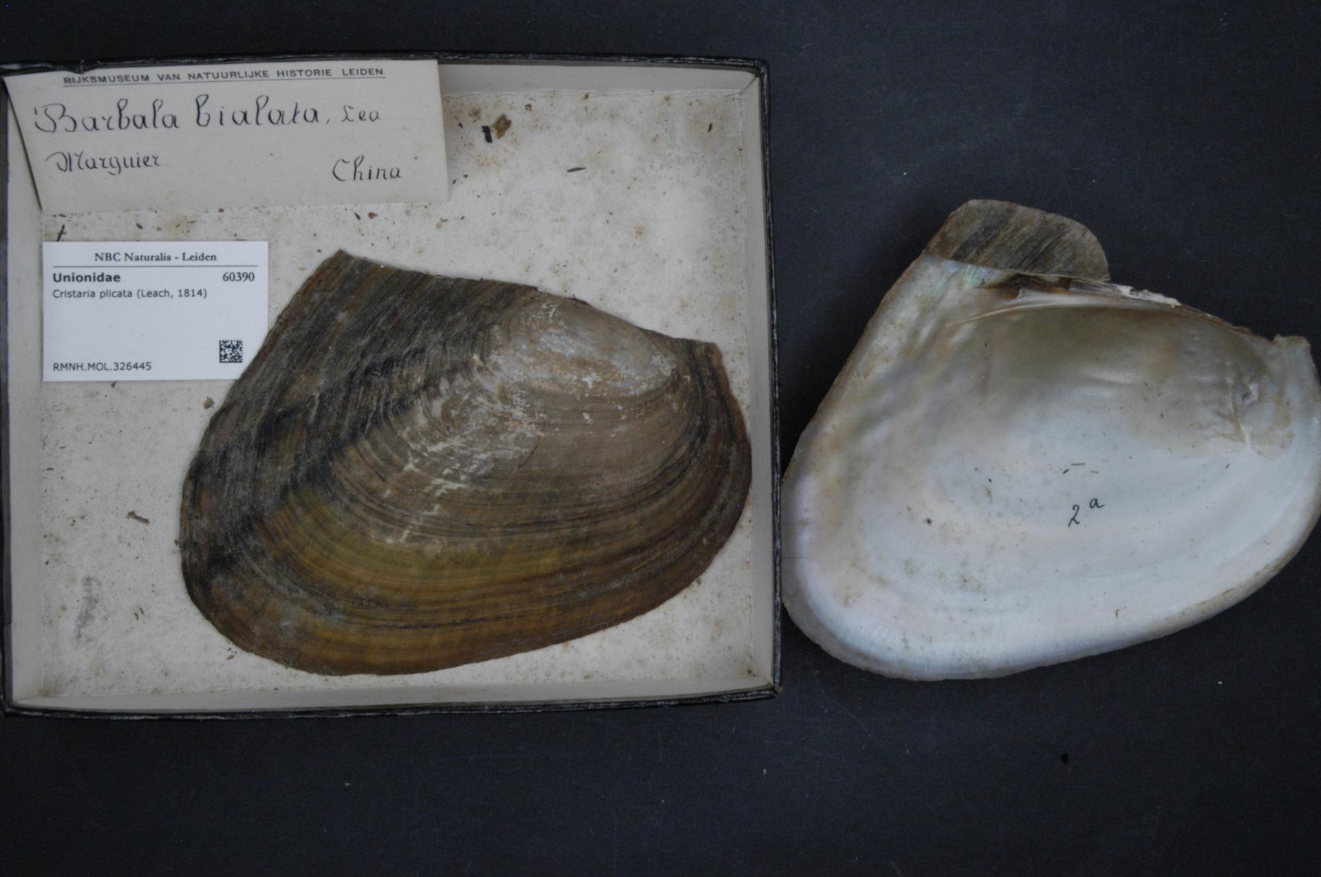 Cristaria plicata (Leach, 1814)